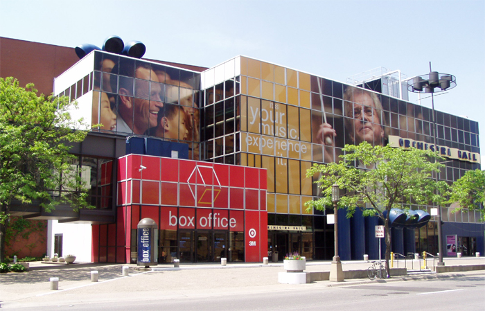 Orchestra Hall, Minneapolis taken in 2006